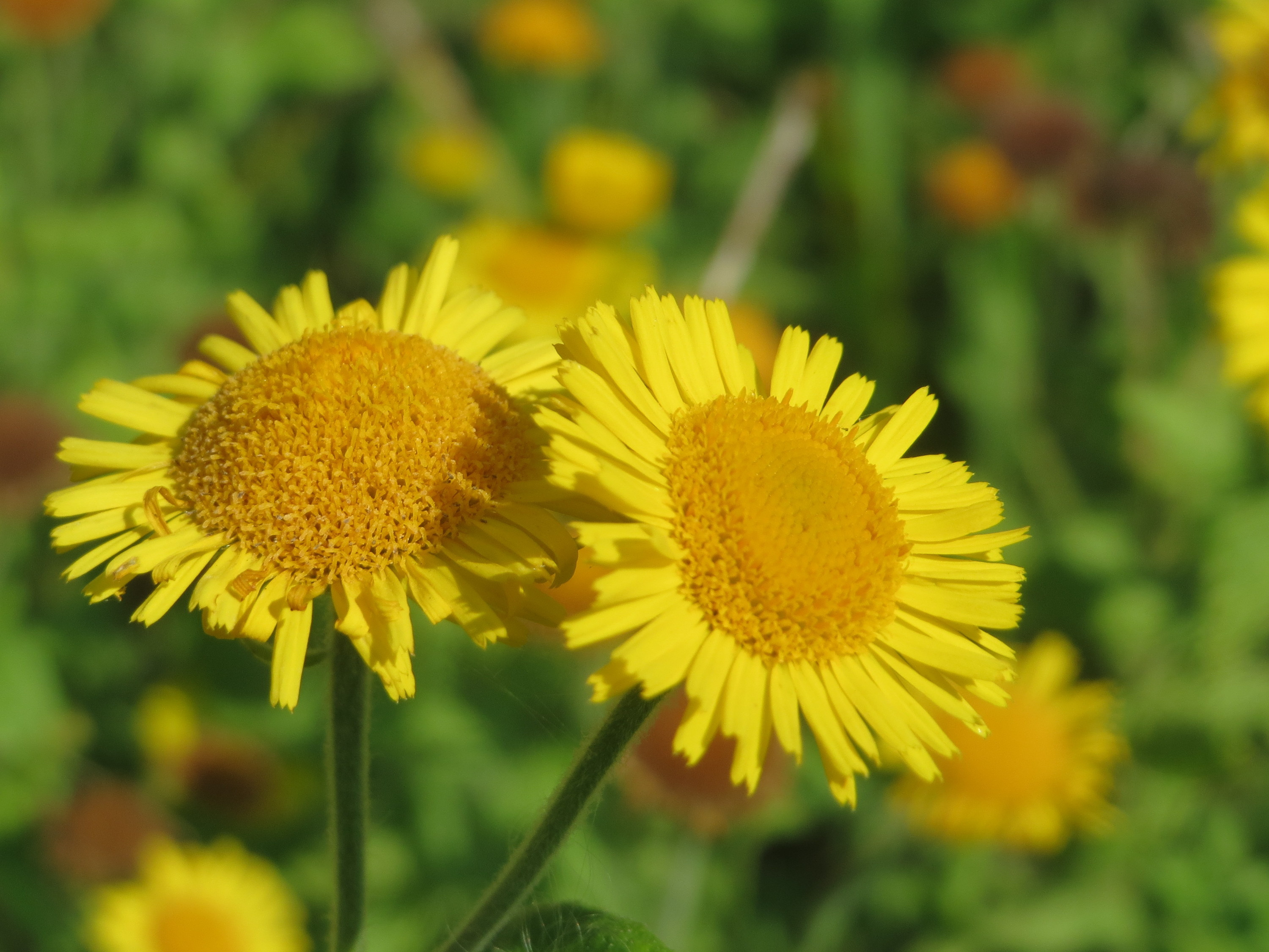 Großes Flohkraut (Pulicaria dysenterica) im Hockenheimer Rheinbogen